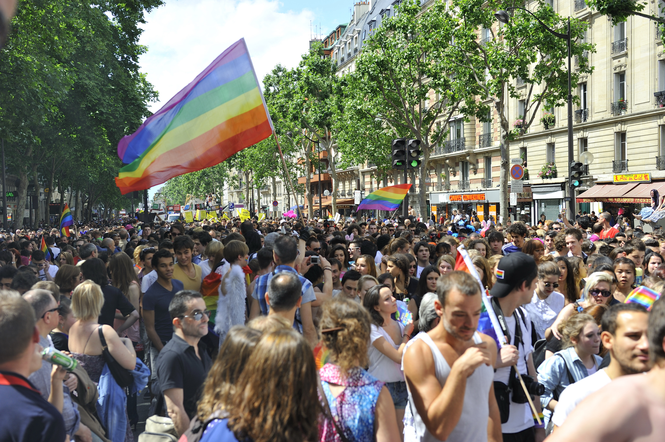 Paris Gay Pride 2012